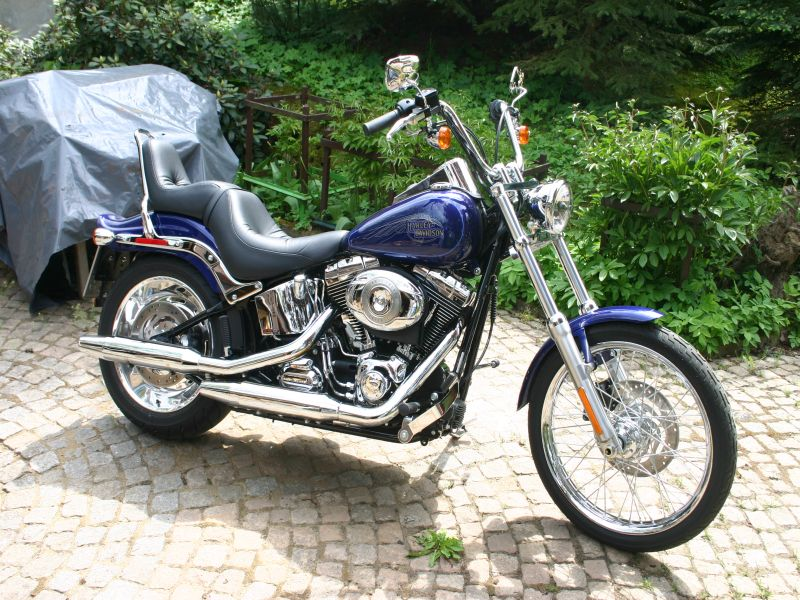 Harley-Davidson Softail Custum, Modell 2007